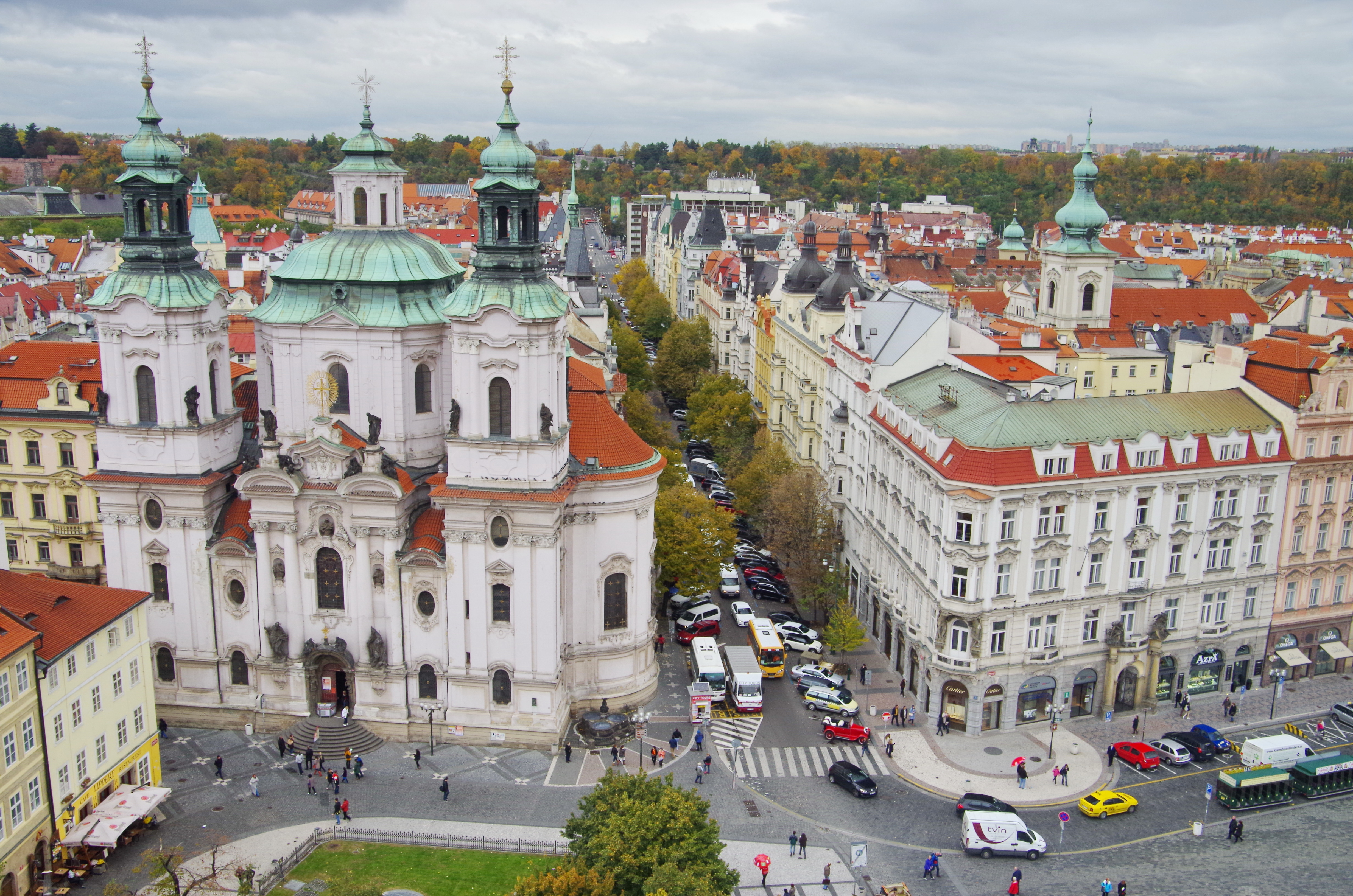 Blick vom Altstädter Rathausturm zu St. Niklas und Parizkaja